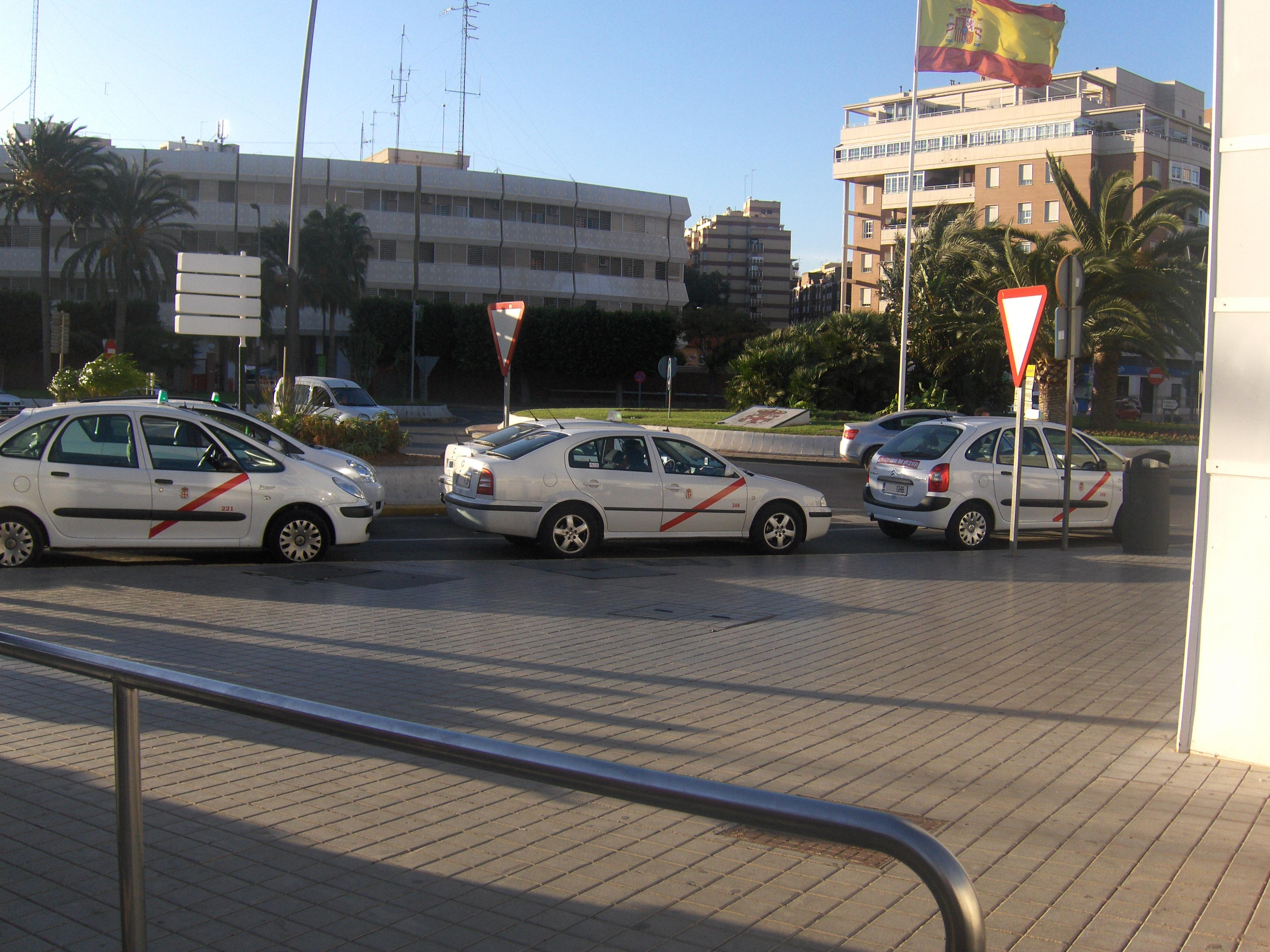 Taxis parados en Almería, junto a la Estación Intermodal